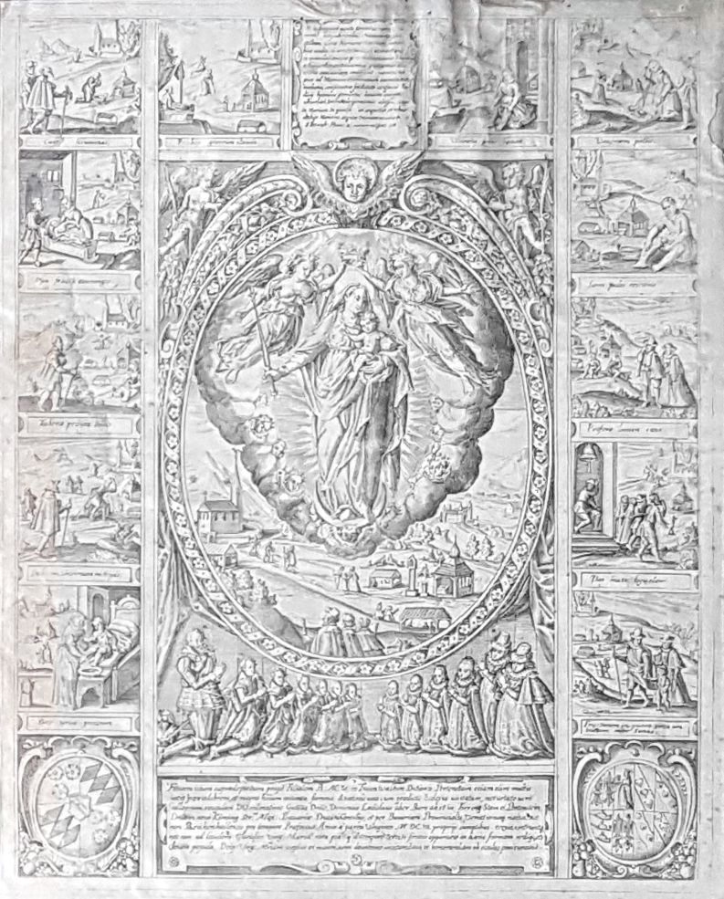 Kupferstich aus der Frauenbrunn-Kapelle (Traunwalchen): Madonna mit Kind über der 1606 gestifteten Marienwallfahrt Traunwalchen; um das Hauptbild Szenen der Gründungsgeschichte